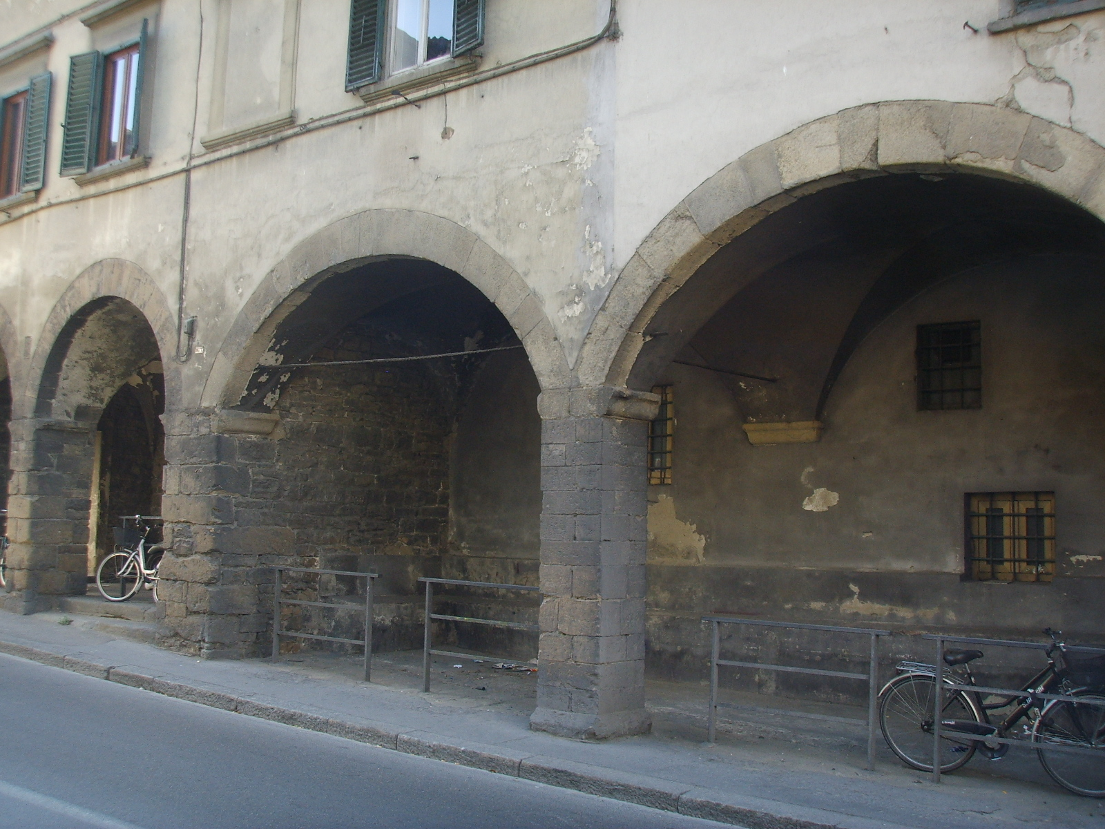 Via senese, ex-lavatoi porticati